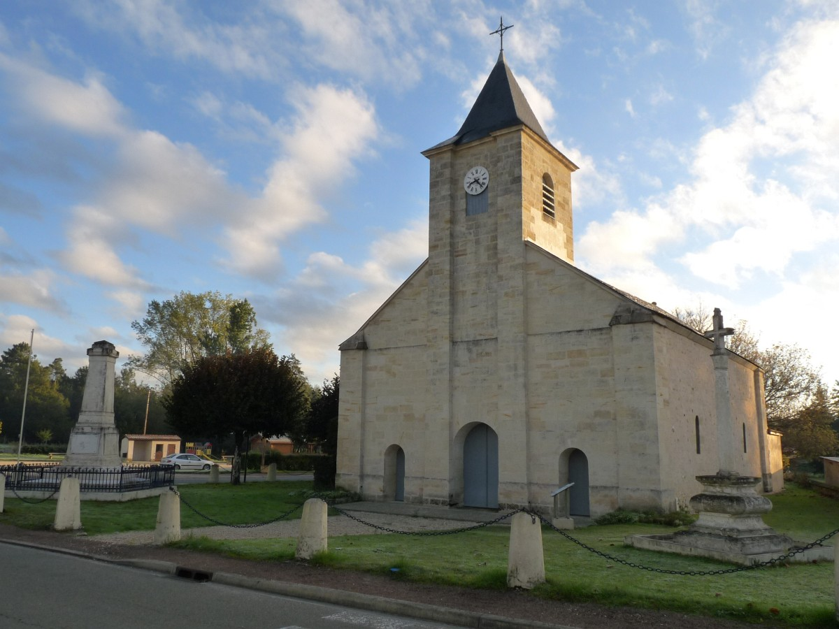 Eglise et monument aux morts de Bedenac, Charente-Maritime, France